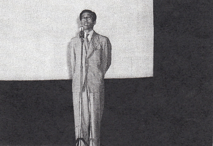 滋賀県守山町（現在の守山市）の大黒座（のちの守山映画劇場）で舞台挨拶を行う宇野宗佑、1952年の写真。